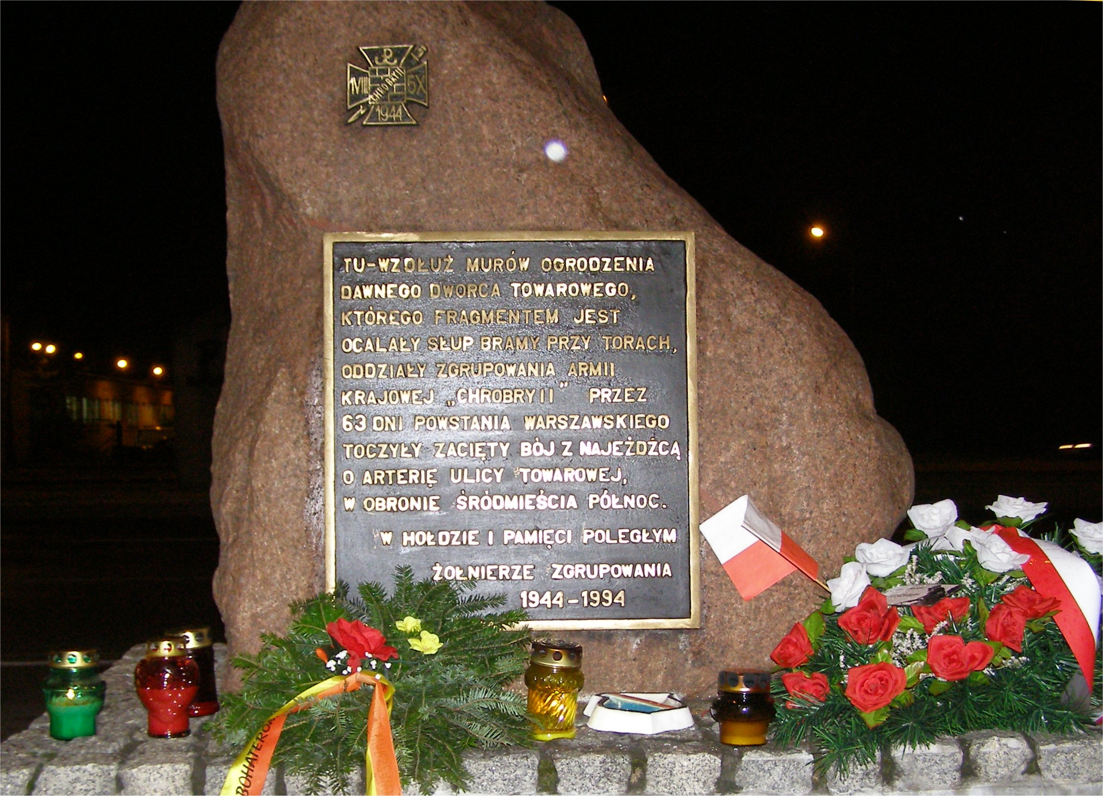 Miejsce pamięci baonu Chrobry II walczącego w powstaniu warszawskim, Warszawa, ul. Towarowa )